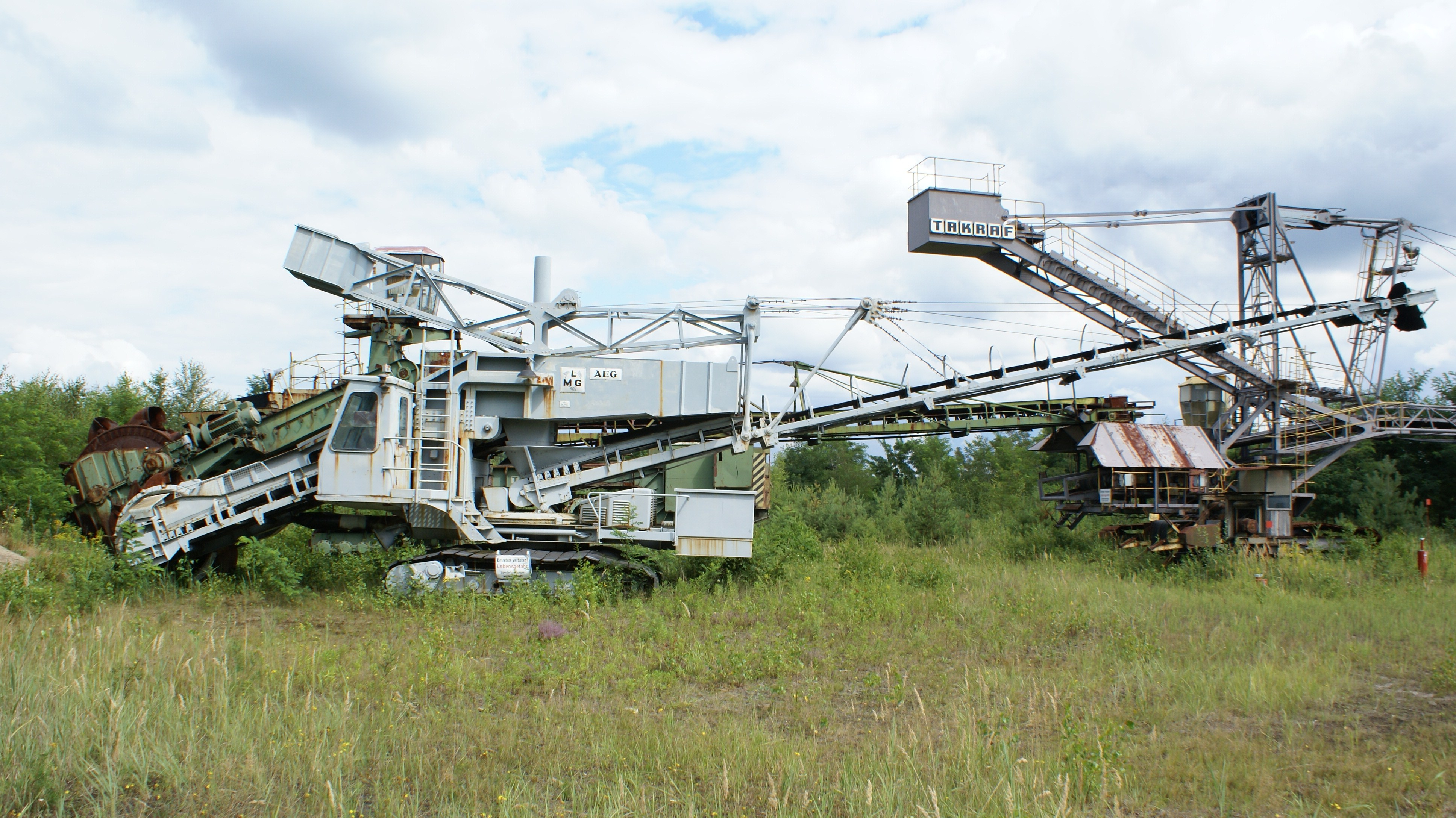 Bildvordergrund: Kleiner Schaufelradbagger der Lübecker Maschinenbau Gesellschaft (LMG). Die Elektroausrüstung stammt von AEG. Bildhintergrund: TAKRAF Schaufelradbagger (links) mit Absetzer (rechts).Energiefabrik Knappenrode in Hoyerswerda-Knappenrode